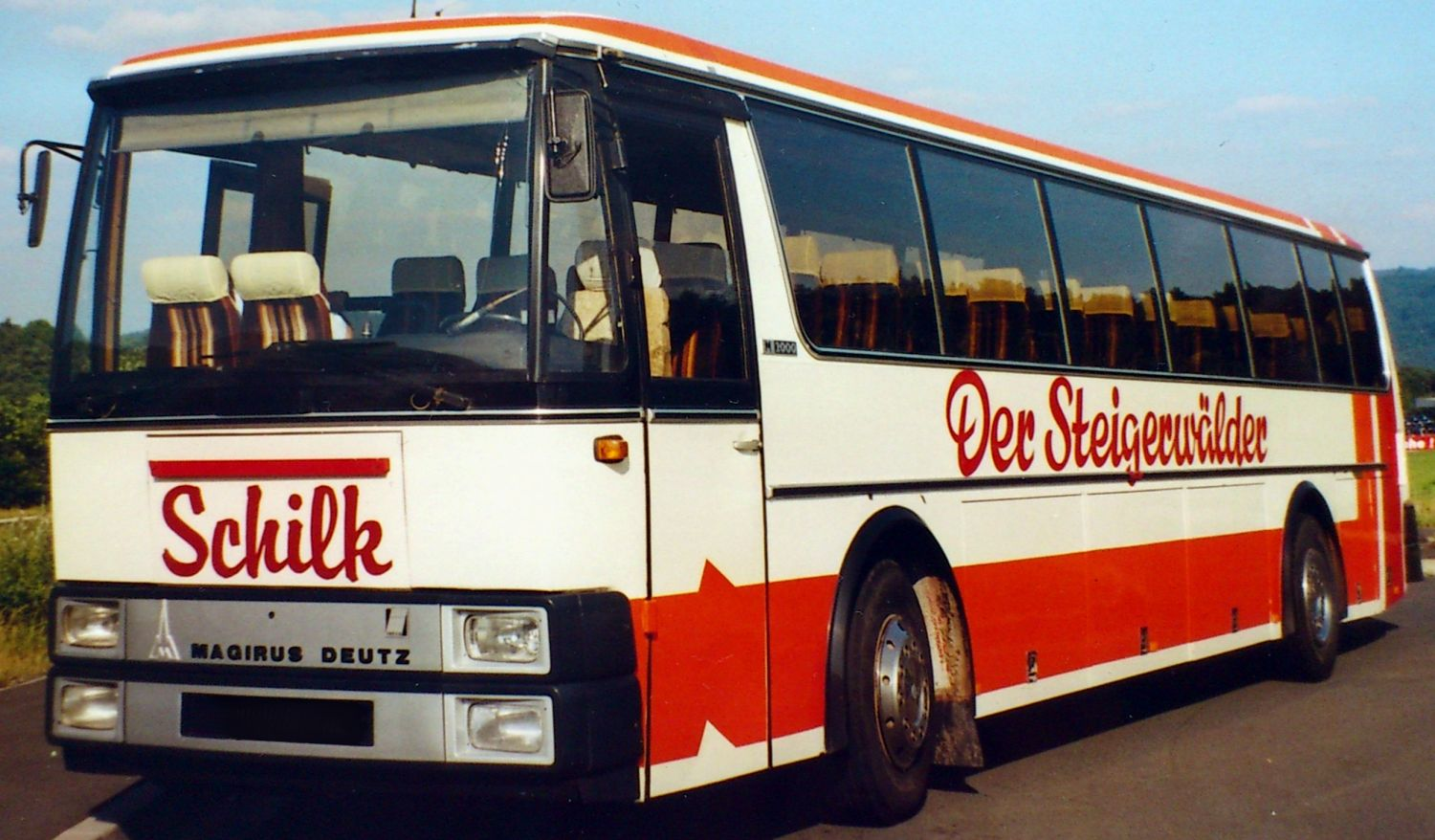 Magirus-Deutz Bus vom Typ M2000